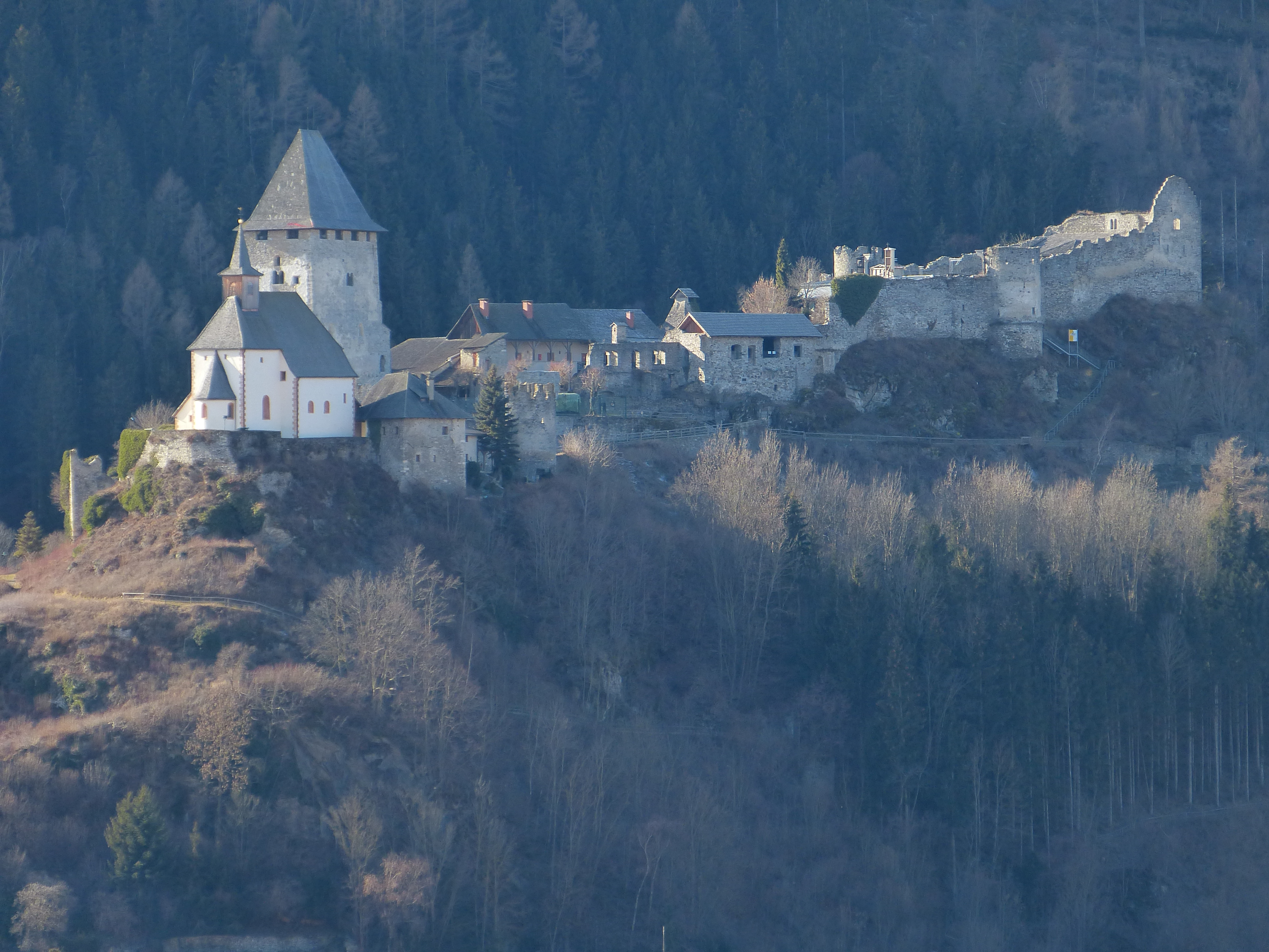 Friesach, Kärnten: Petersberg mit Kirche und Pfarrhof sowie Burgruine Petersberg